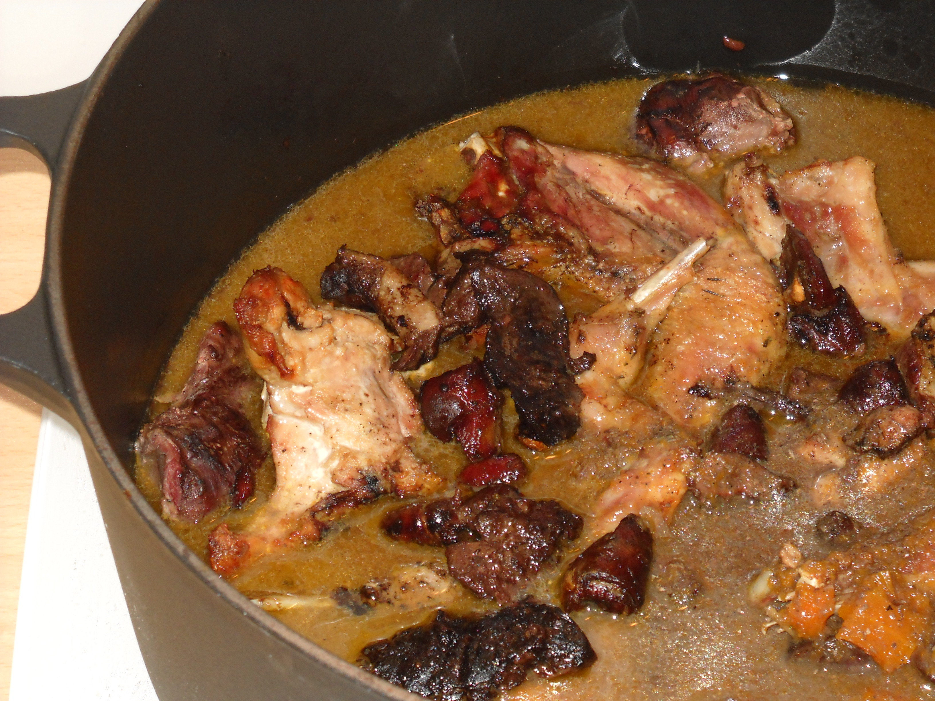 Salmis chasseur de Jacqueline : vue des viandes rôties recouvertes de la sauce zoom